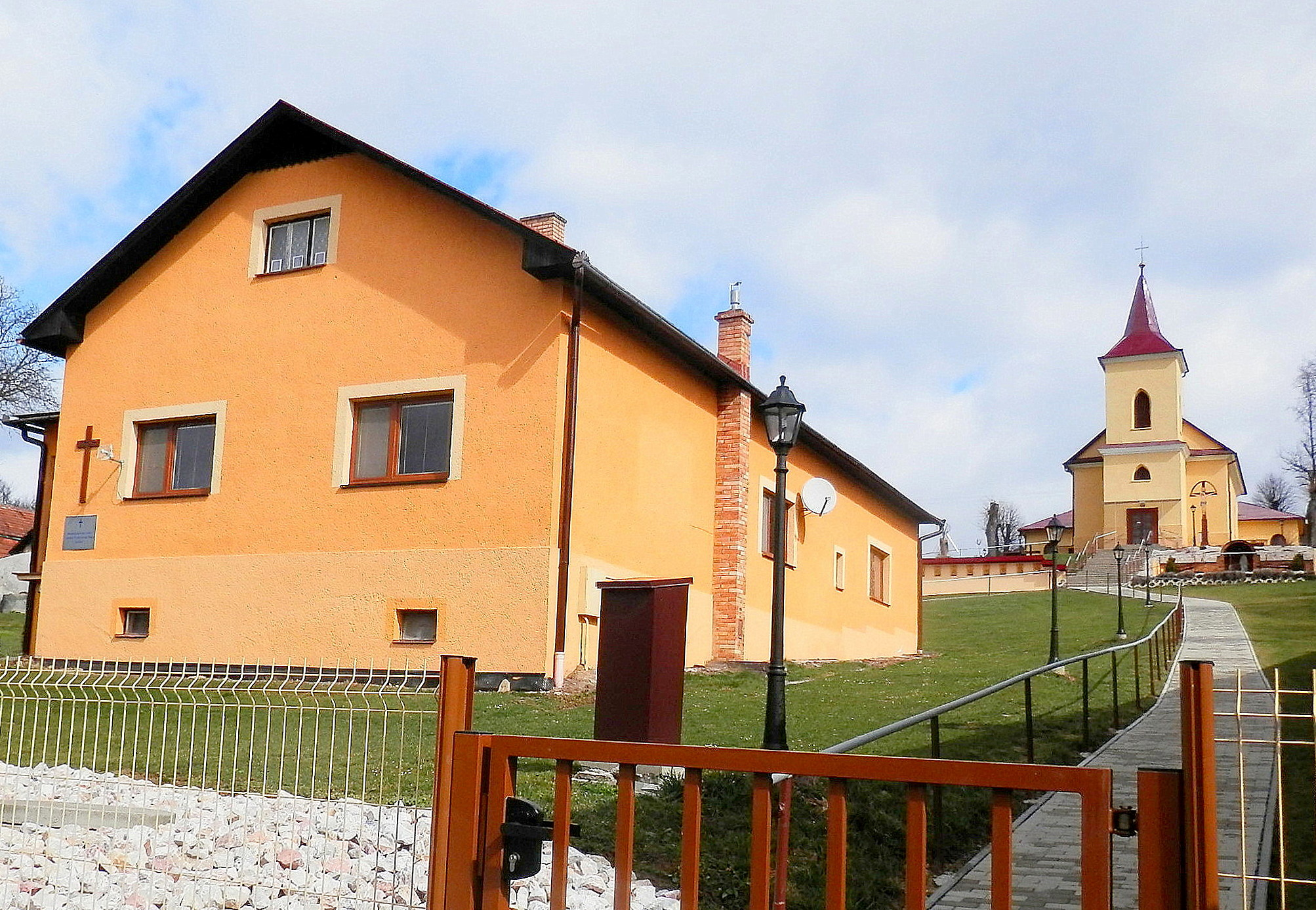 Farský úrad a kostol Premenenia Pána, obec Sedlice, okres Prešov.